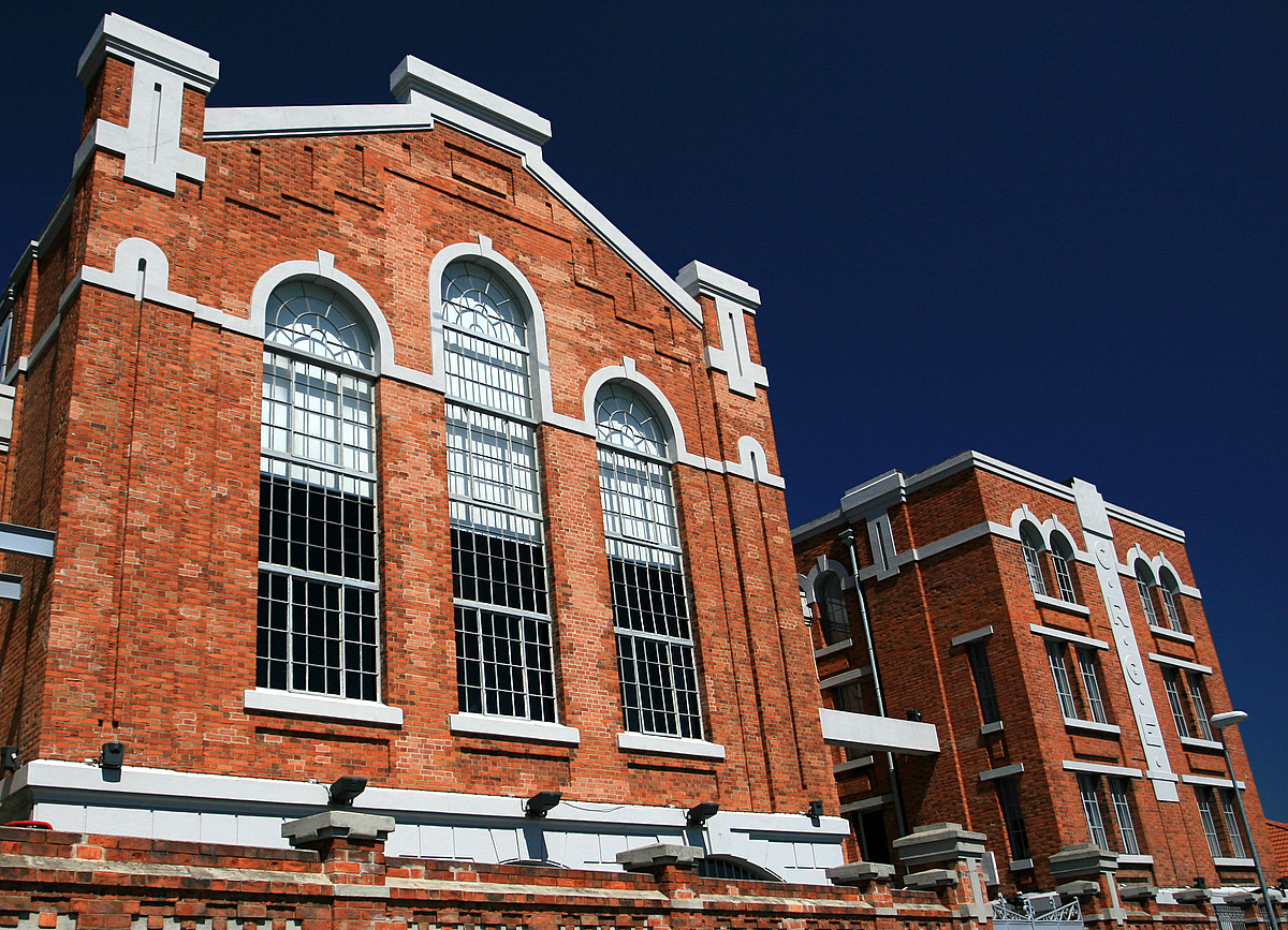 Museu da Electricidade